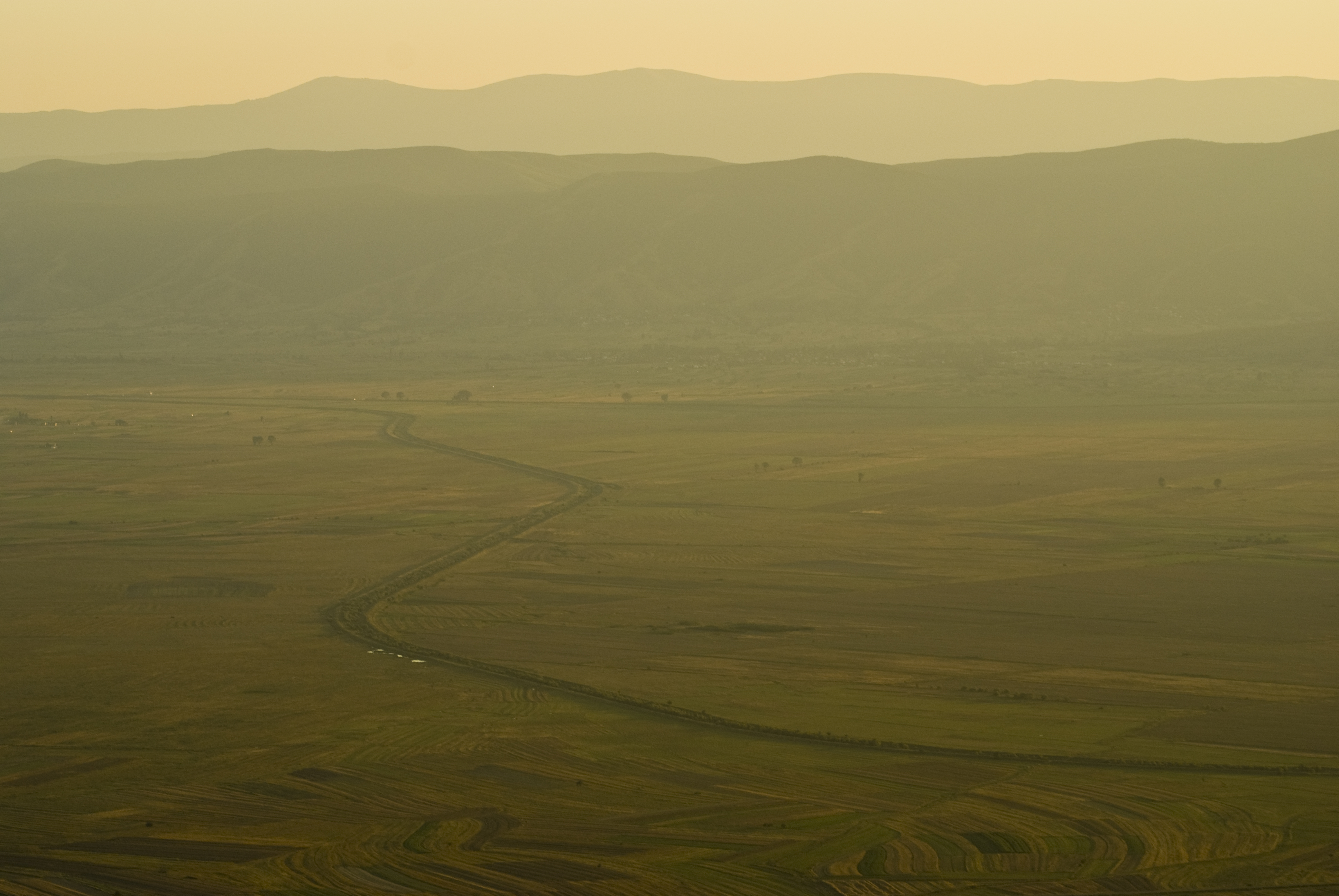 Pelagonija Valley, Macedonia